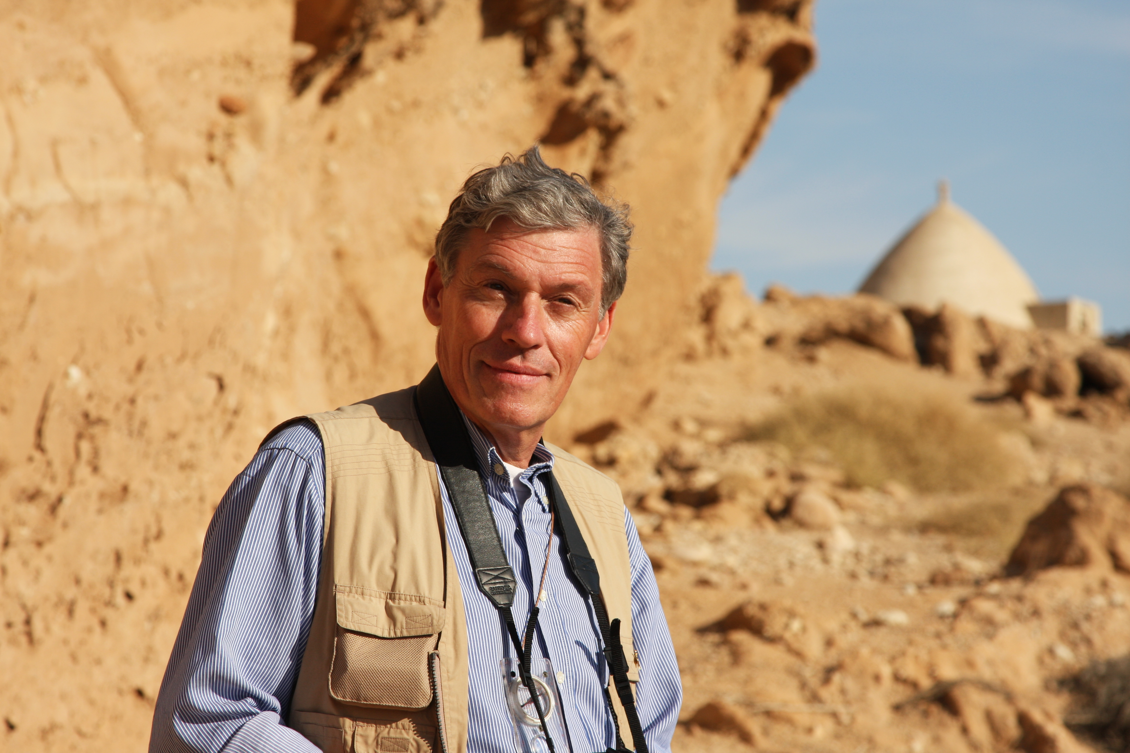 Recherches sur les forteresses sassanides en Iran